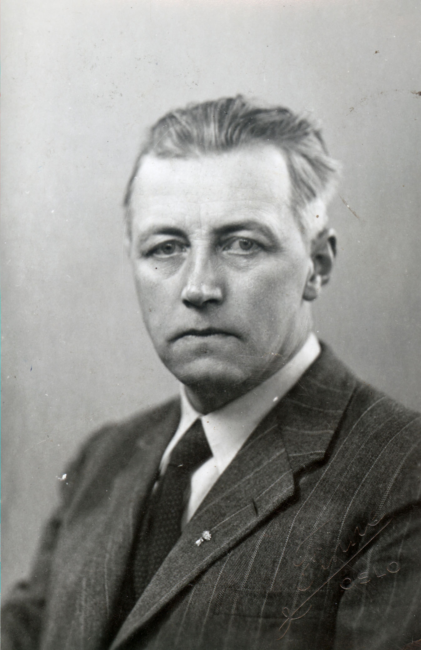 Jon Leirfall (1899–1998), stortingsmann for Nord-Trøndelag (Senterpartiet).